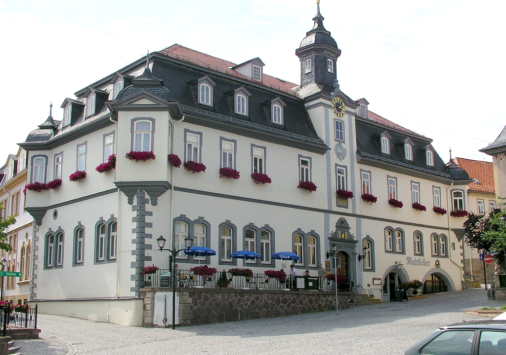 Das Bild zeigt das Rathaus in Ilmenau in Thüringen.